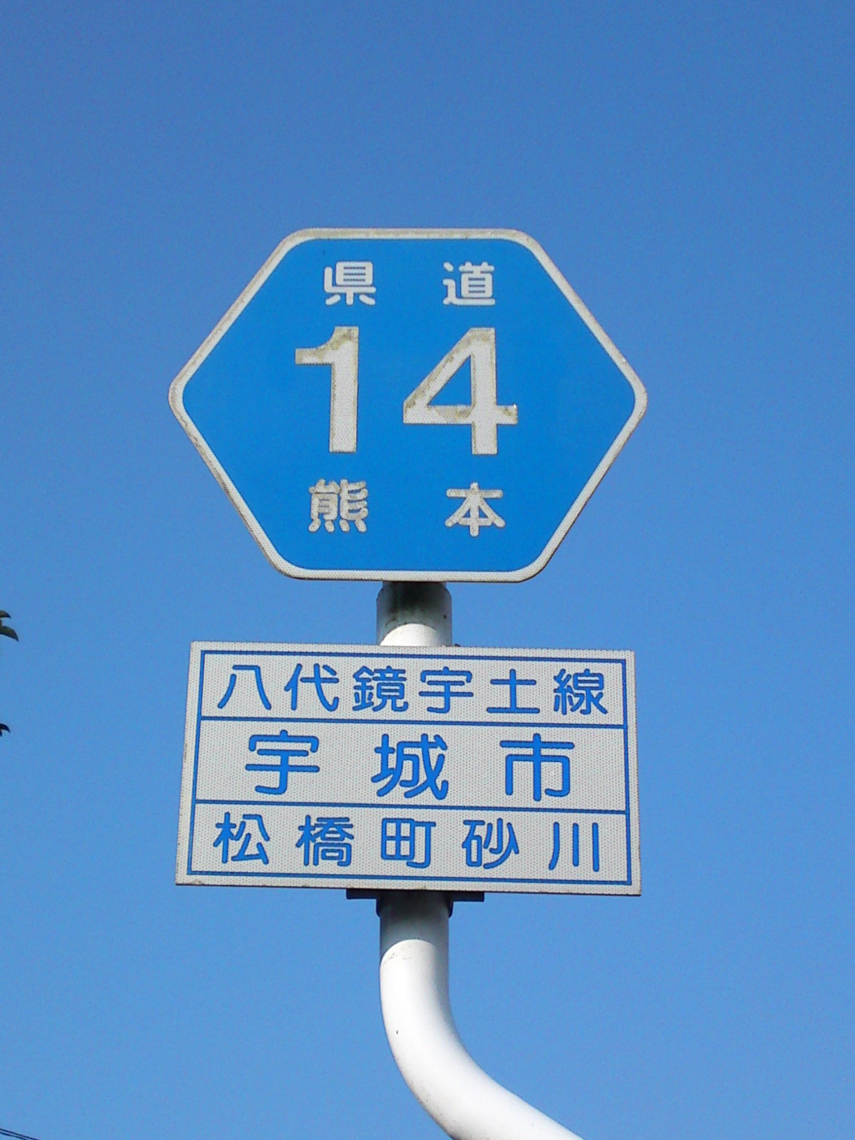 熊本県道14号標識